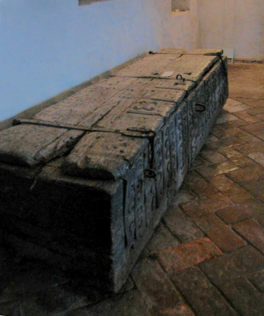 Die sogenaamde Tetzelkas in 'n sykapel van die Nikolaikerk in Jüterbog, Duitsland. Die ysterbeslag van die trommel dateer uit die 14de eeu. Dit word in verband gebring met die aflaatprediker Johann Tetzel.[1]